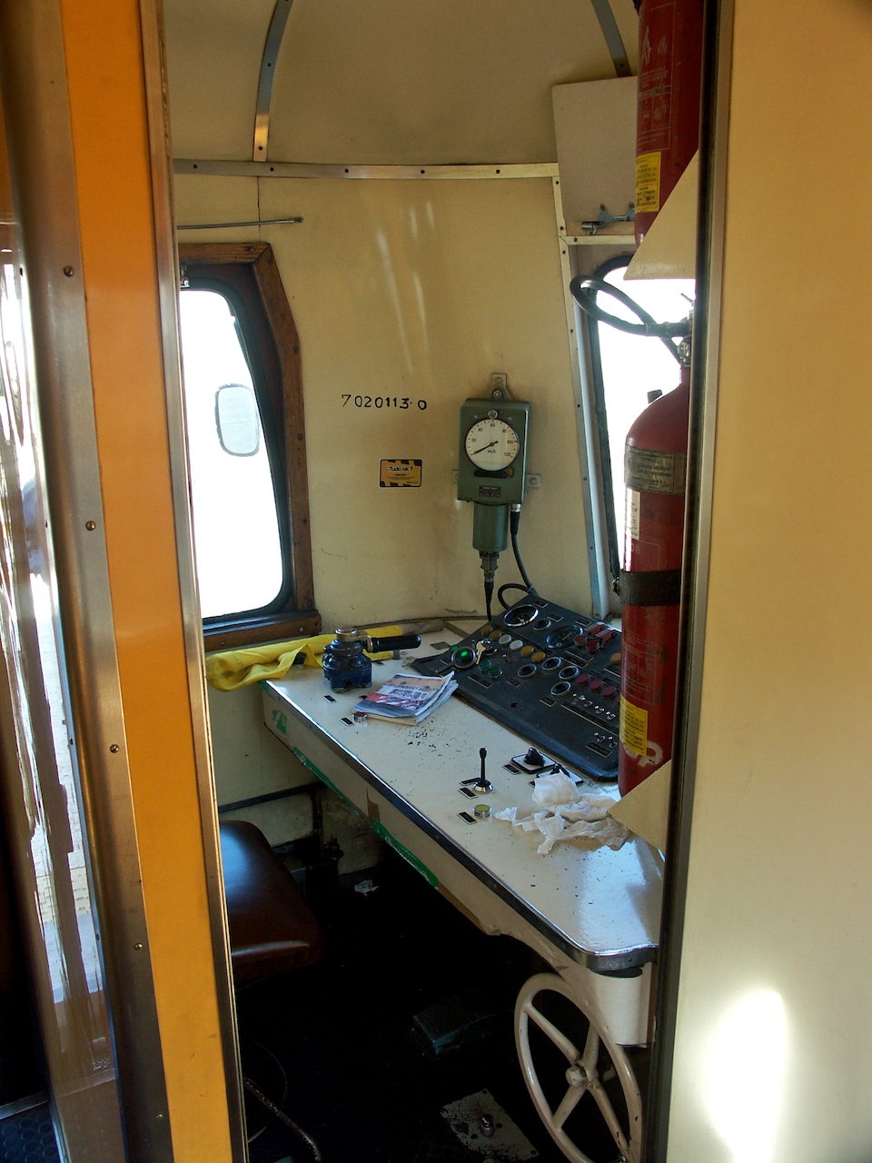 Tipo: Comboio Regional 4802 [Funcheira - Casa Branca] Local: Estação da Funcheira [Linha do Alentejo, PK 217 • Linha do Sul, PK 164] Data e hora: 4 de Dezembro de 2004 [10h47] Material: Automotora 0113 [Unidade Simples Diesel - Nohab] pormenor da cabine. vídeo desta viagem aqui.